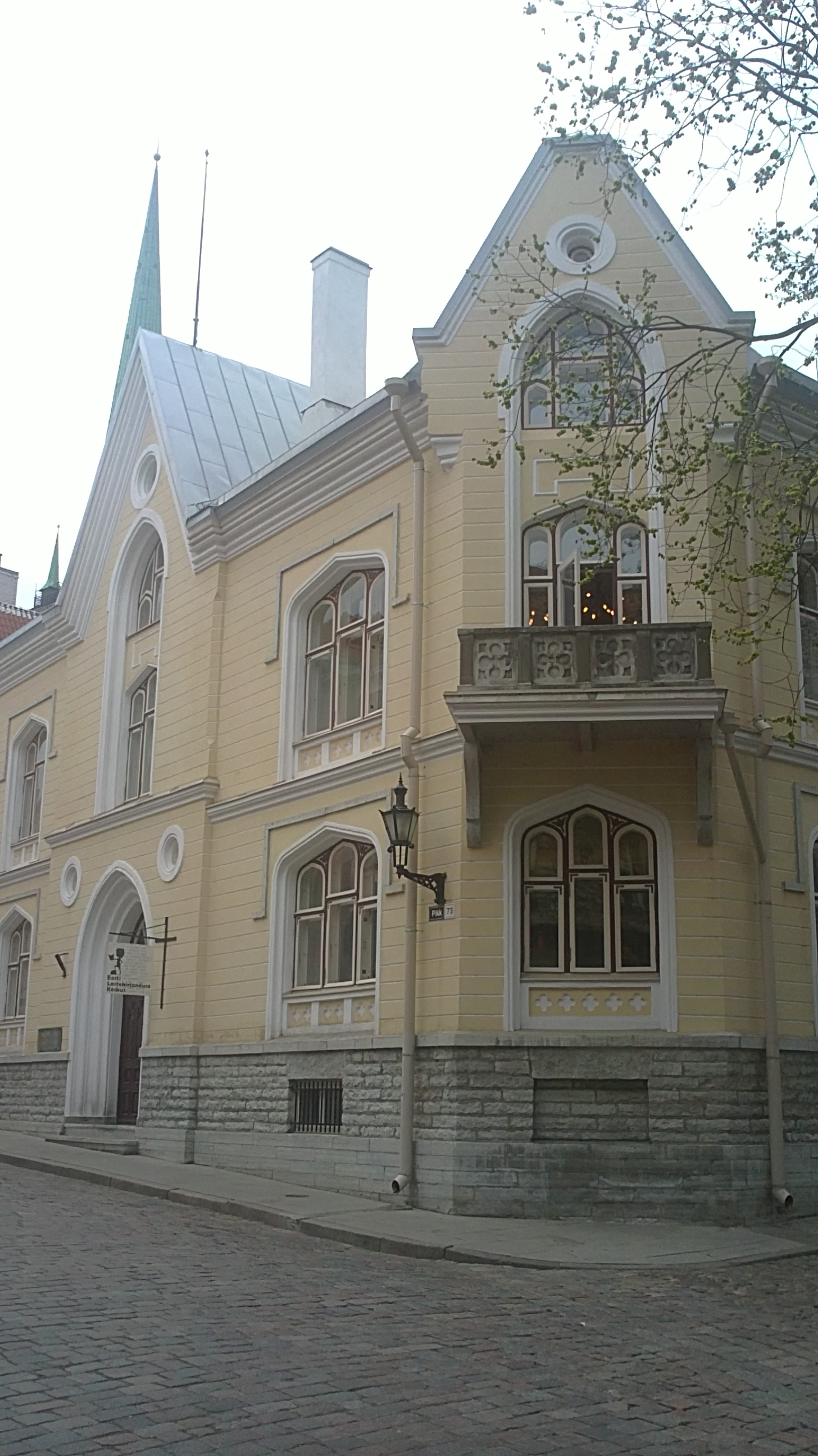 Tallinna vanalinna, Pikk tänav 73 hoone